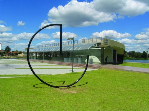 MADI Múzeum, Sobral, Brazília. Az előtérben Bolivar Gaudi szobra